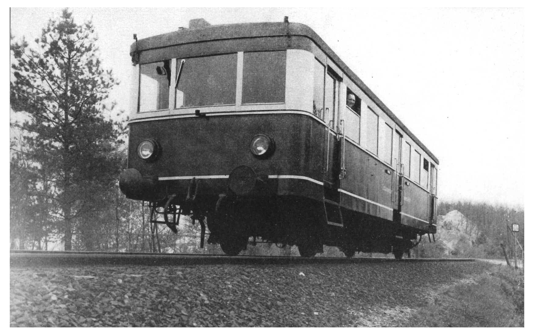 Foto des Zschornewitzer Kleinbahn T1 auf einem Foto von AFA